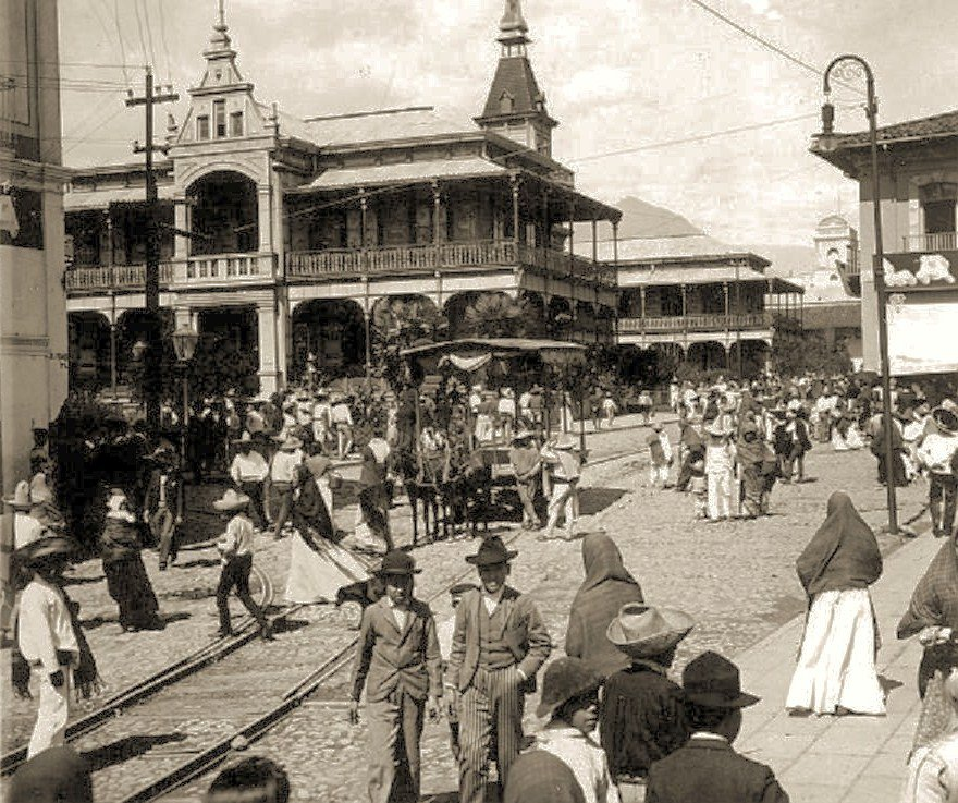 Palacio de Hierro de Orizaba, Veracruz. México